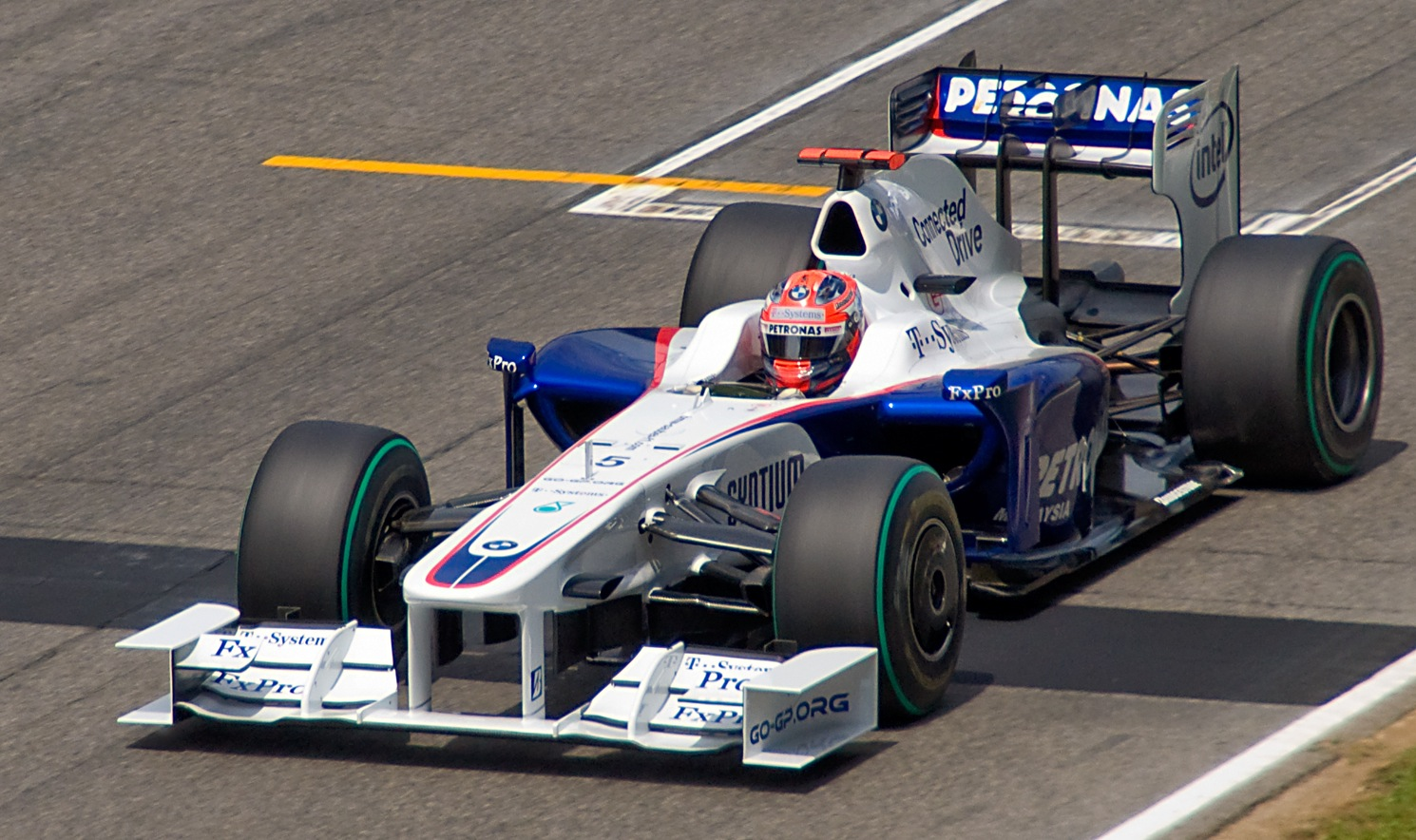 Nikon D90 + Sigma 18-200 DC OS HSM 1/1600s - F/9 - 200mm - ISO640